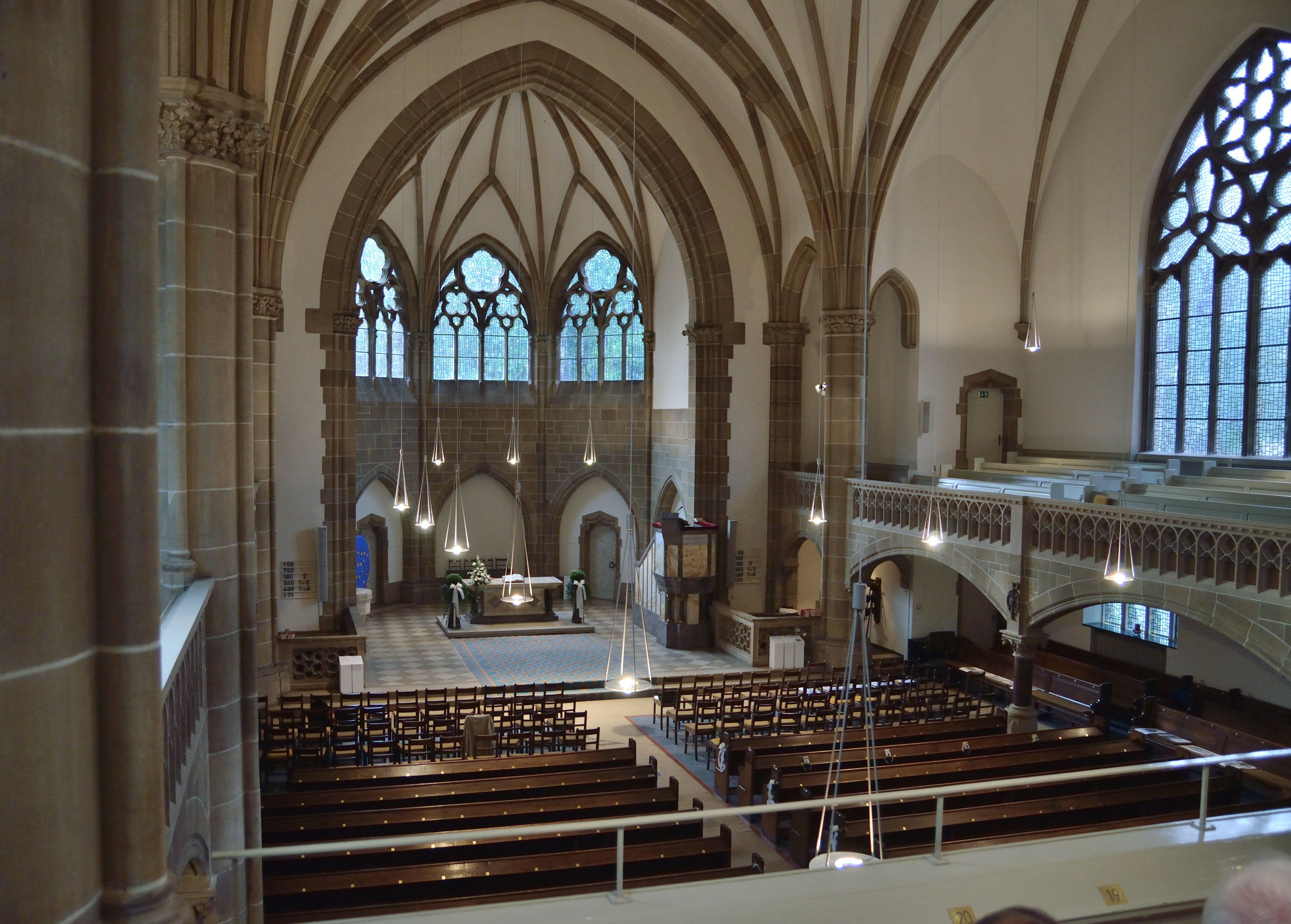 This is a photograph of an architectural monument. Christuskirche Detmold, Innenraum